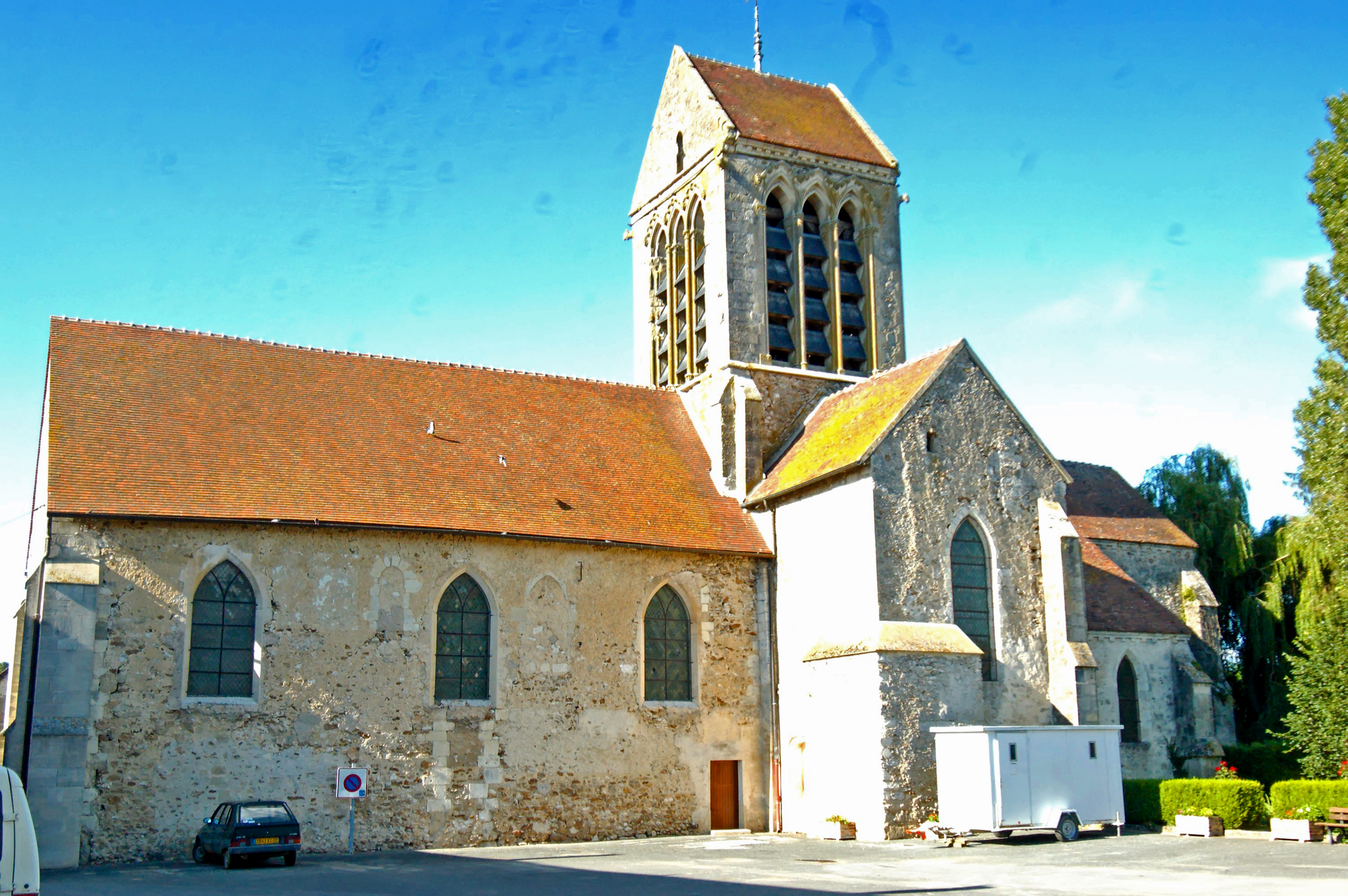 L'église de La Chapelle-Monthodon.